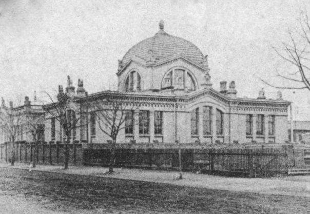 Gebäude der Saccharinfabrik Salbke (Fahlberg-List)